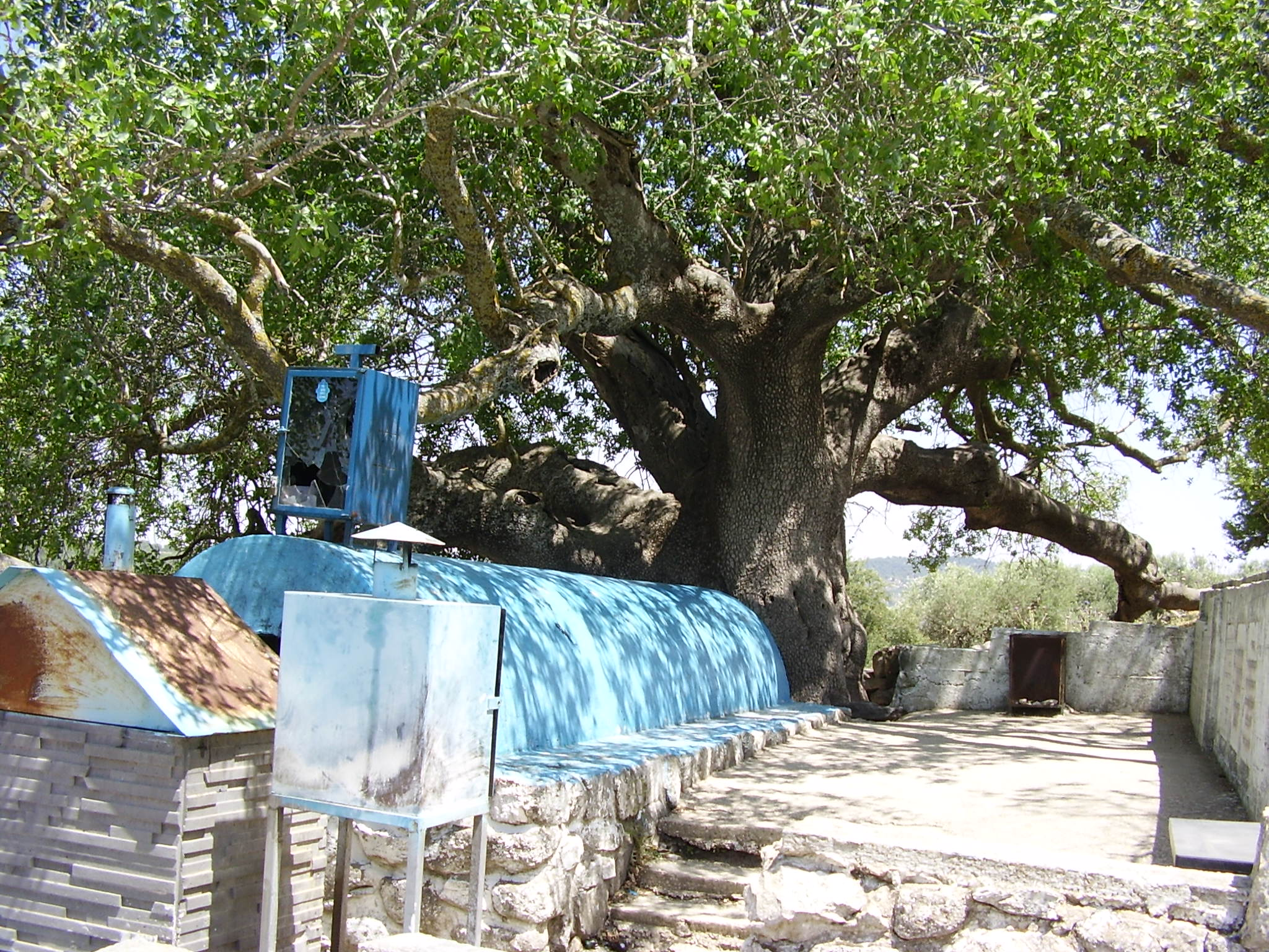 קבר רבי טרפון בצל אלה אטלנטית בקדיתא רישיון נוצר על ידי משתמש:Avi1111